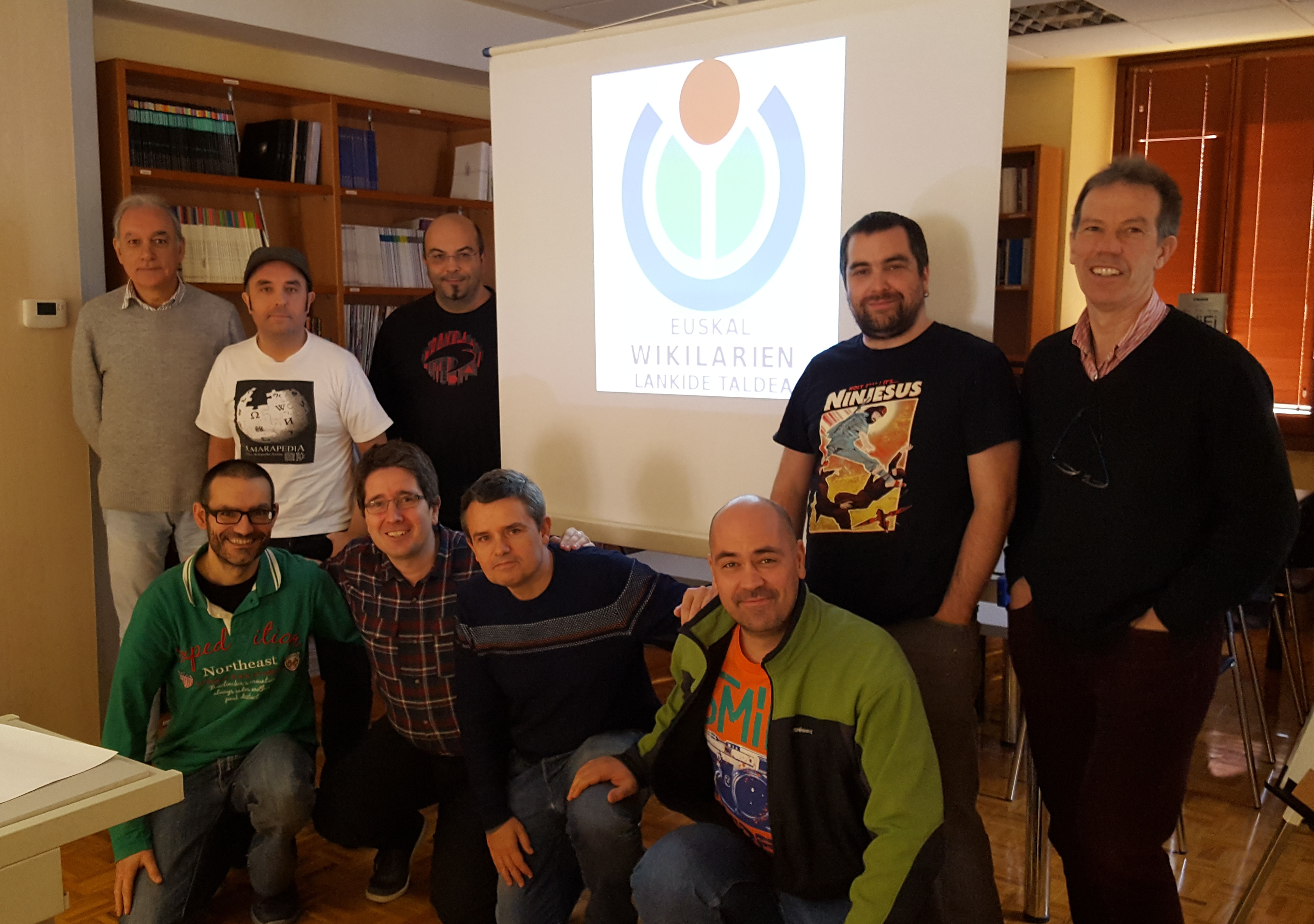 EWKEko urteko bilera Eibarren